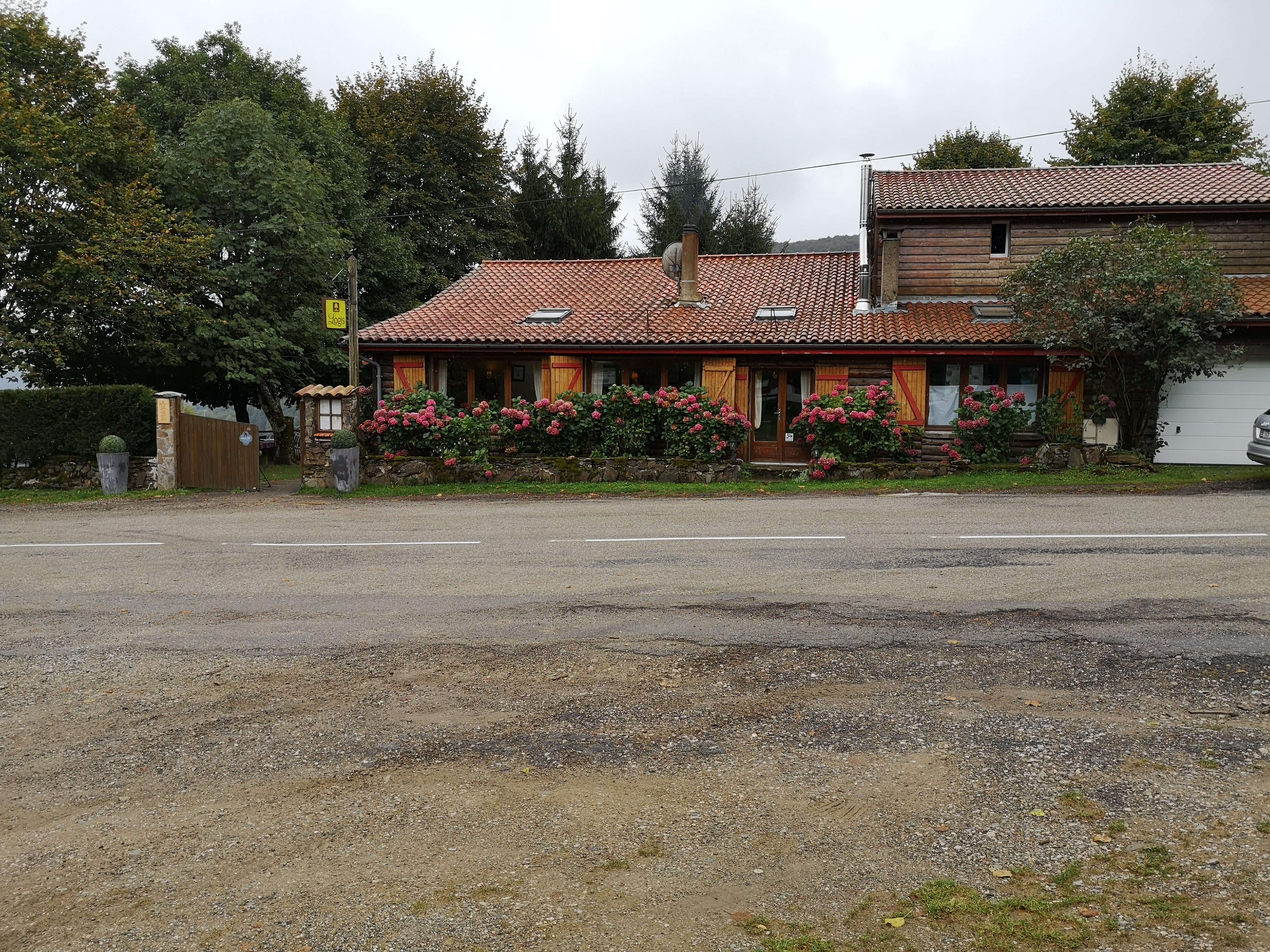 Massif de l'Arize